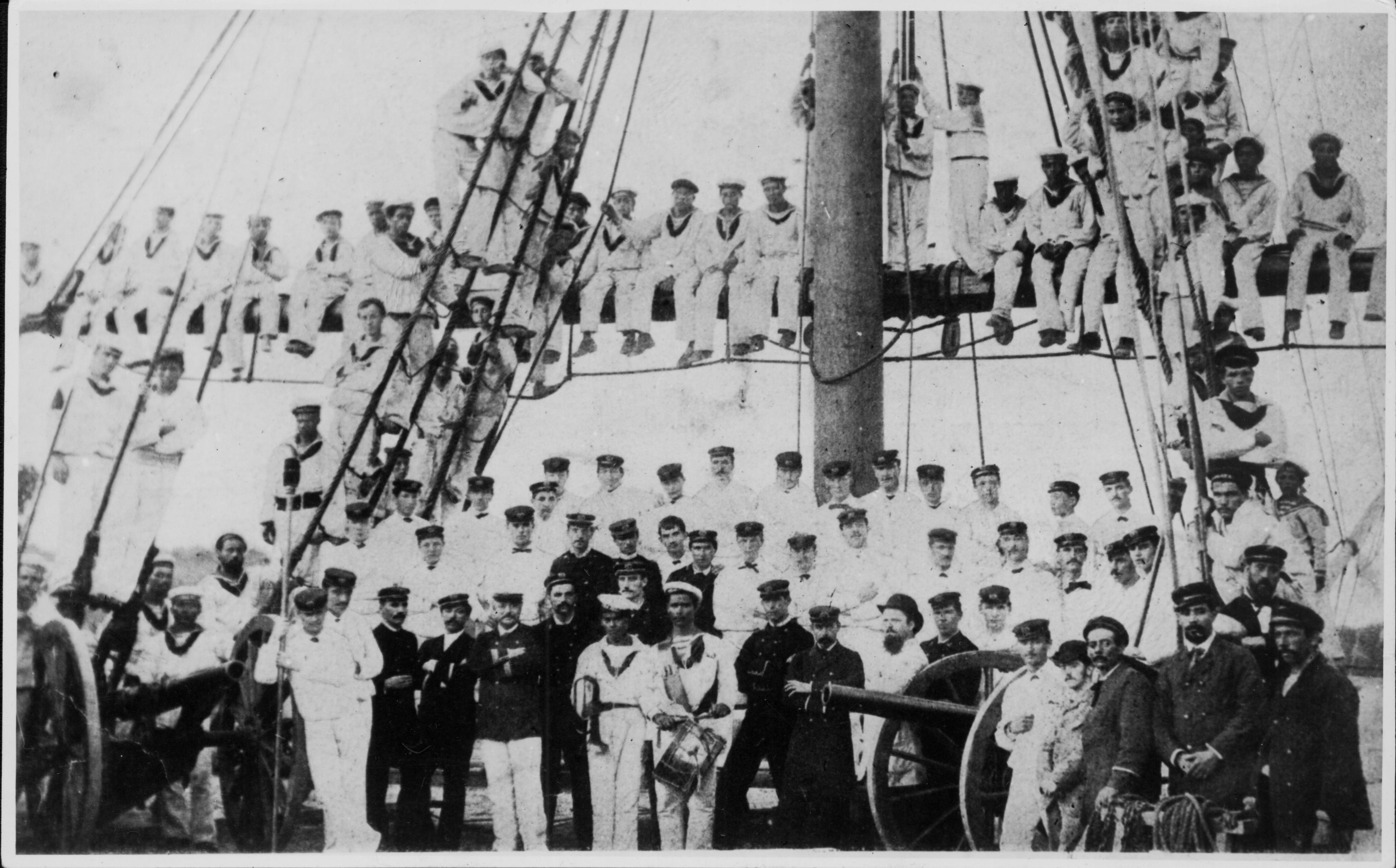 Экипаж корвета «Ла Архентина»